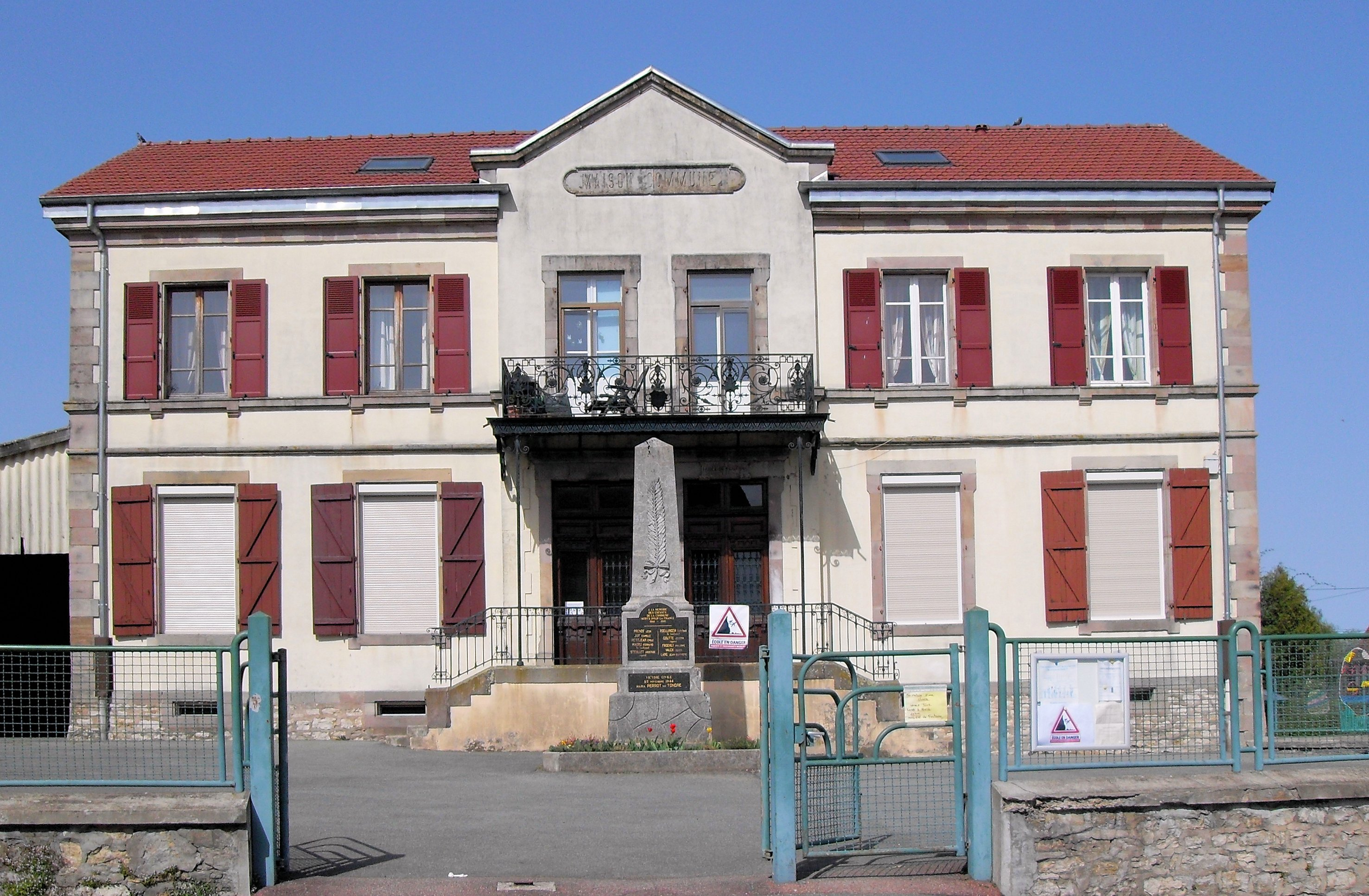 La mairie-école d'Angeot